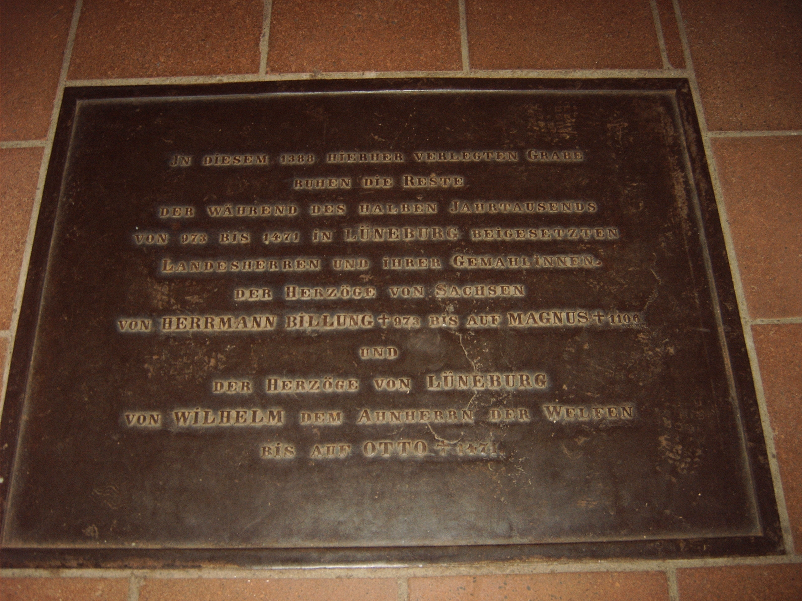 Grabstätte der Herzöge von Sachsen und der Herzöge von Lüneburg in der St. Michaeliskirche in Lüneburg